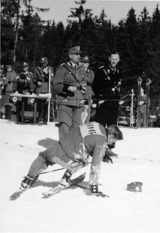 Skimeisterschaften Kitzbühel 1939 Auf der Strecke